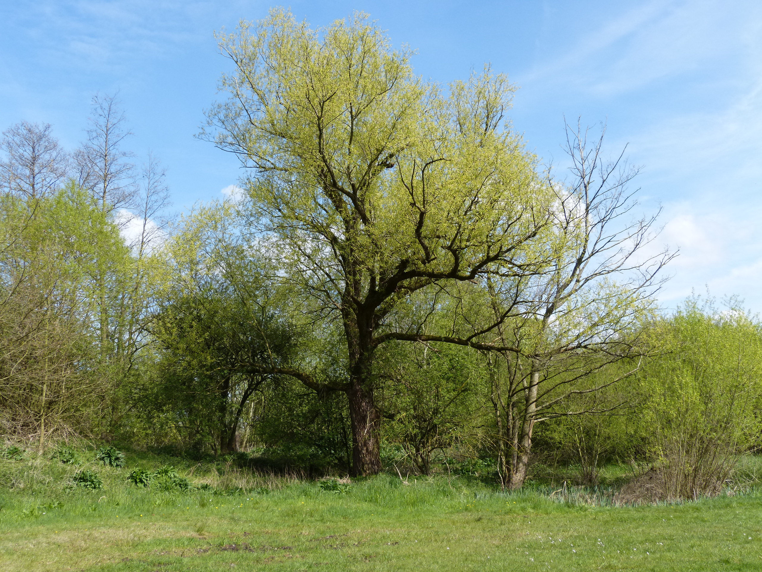 Alter Baumbestand, markanter Einzelbaum (Salix sp.?) an der großen Wiese im Naturschutzgebiet „Auf dem Stein“ in Menden